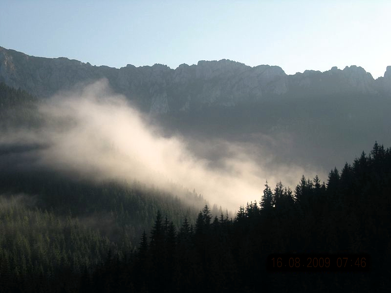 Nagy-Hagymás látképe